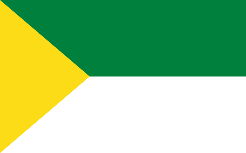 Bandera de Carlos Julio Arosamena Tola